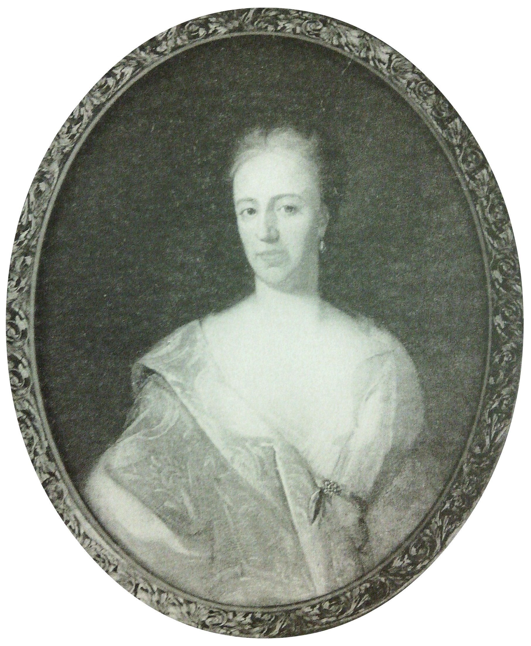 Княгиня Ирина Михайловна Долгорукая, ур. Черкасская (ум. 1720)